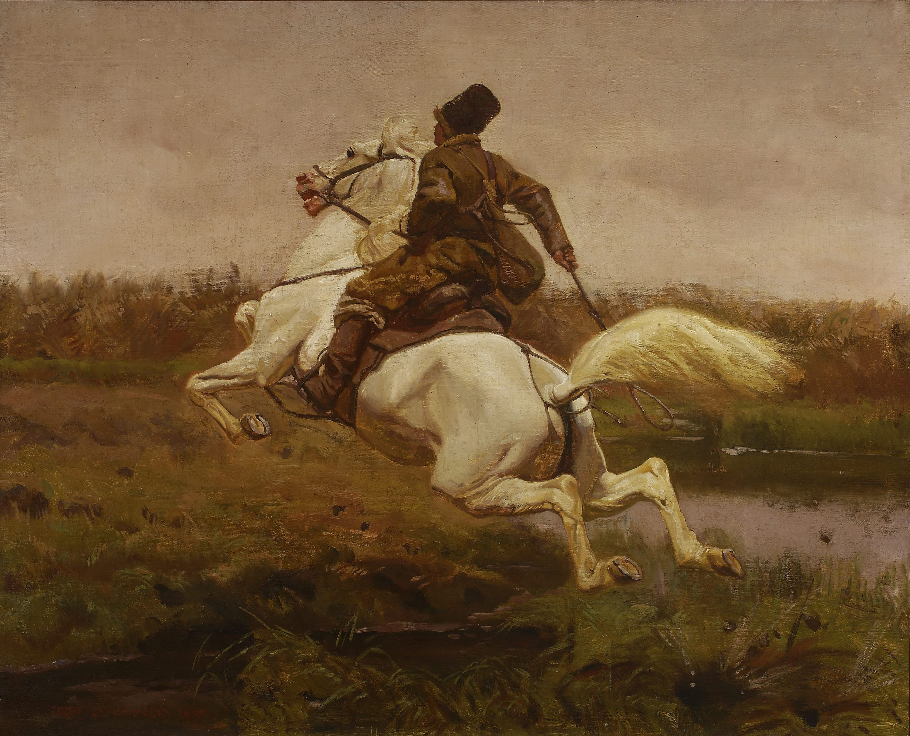 label QS:Lpl,"Kozak na koniu (Dojeżdżacz)"